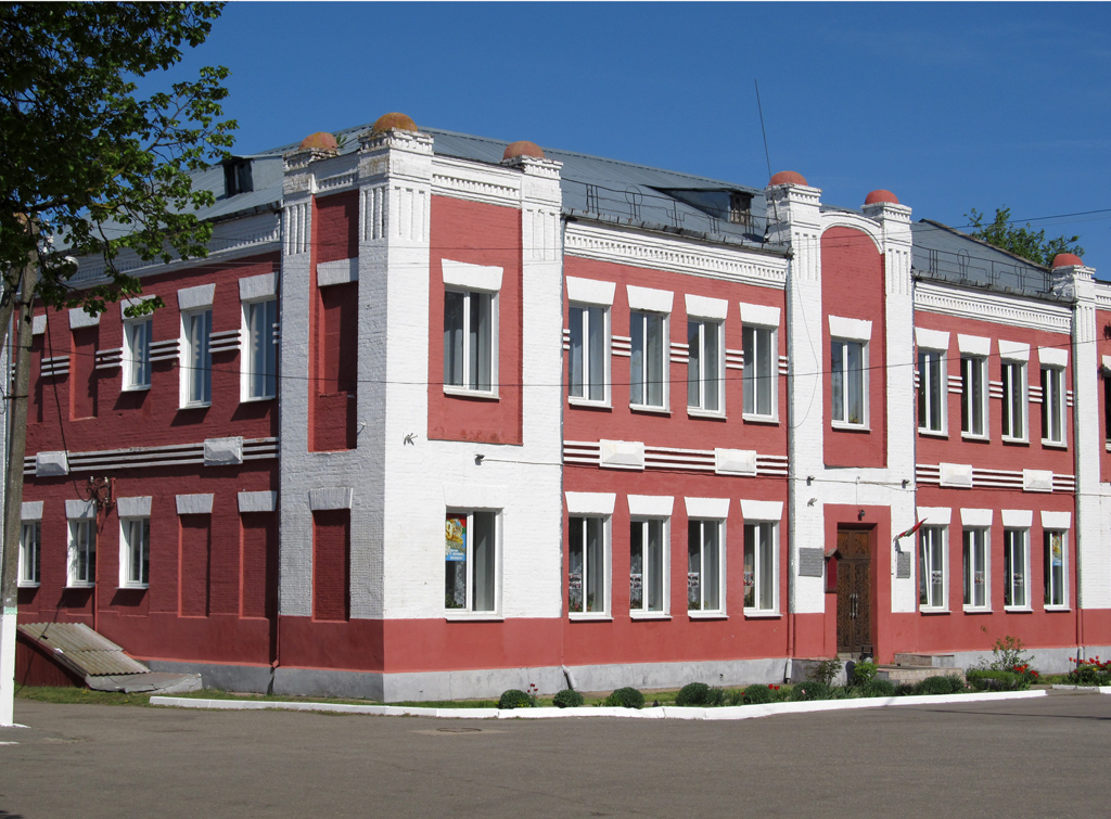 Чэрвень. Дом Кудзіна